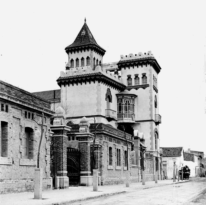 Casa i vista de Masnou. Josep Salvany i Blanch (1912)